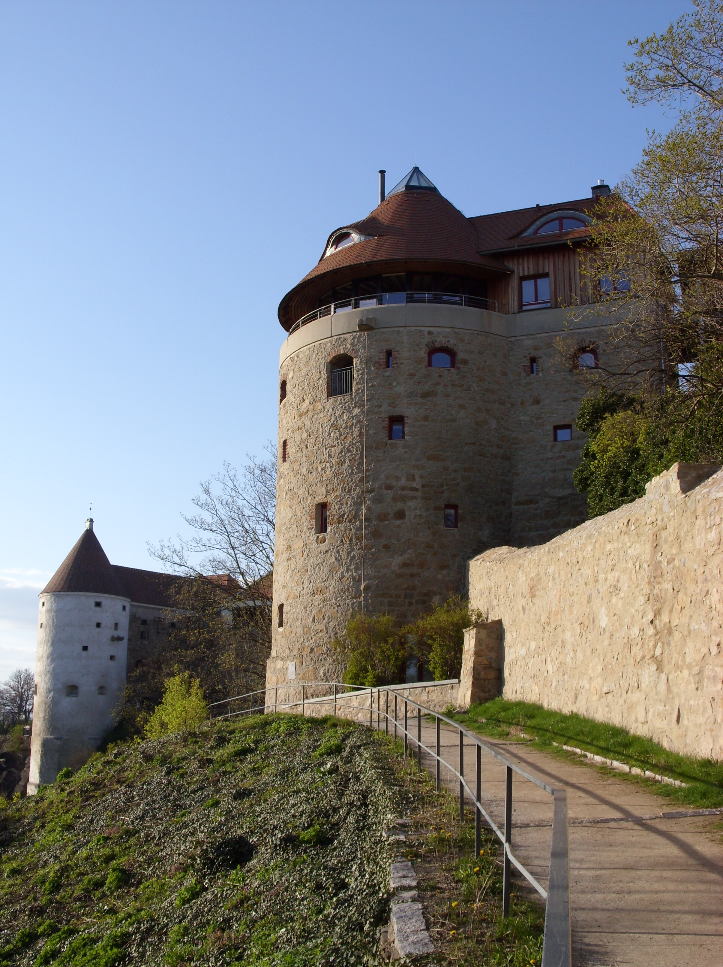 Mühlbastei (rechts) und Burgwasserturm in Bautzen.